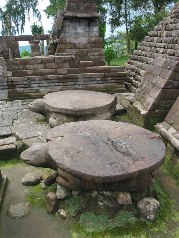 Candi Sukuh